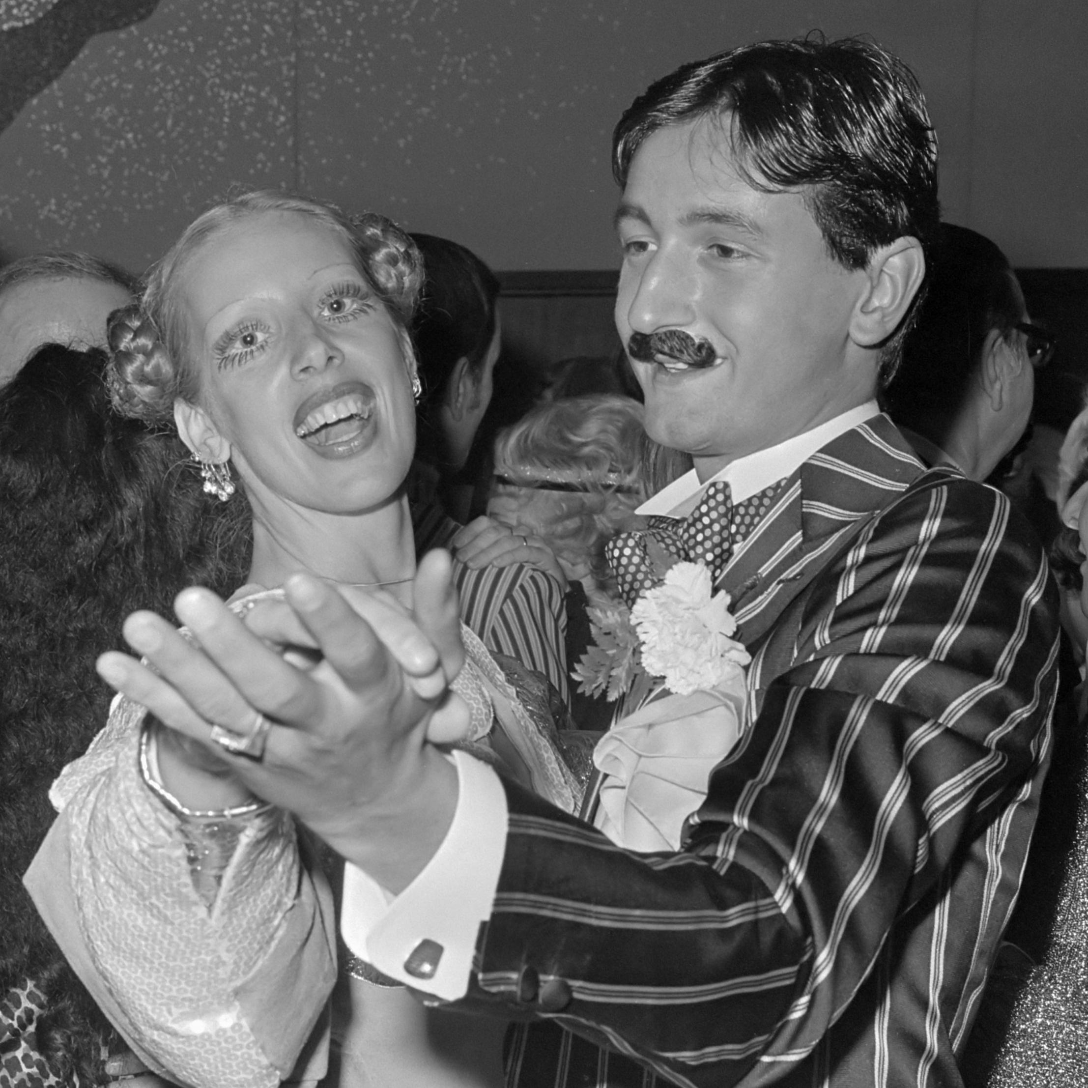 Galapersbal in Ohma (sic) hotel (Okura hotel) in aanwezigheid van prinses Margriet en Pieter van Vollenhoven; Mathilde Willink met een vriend